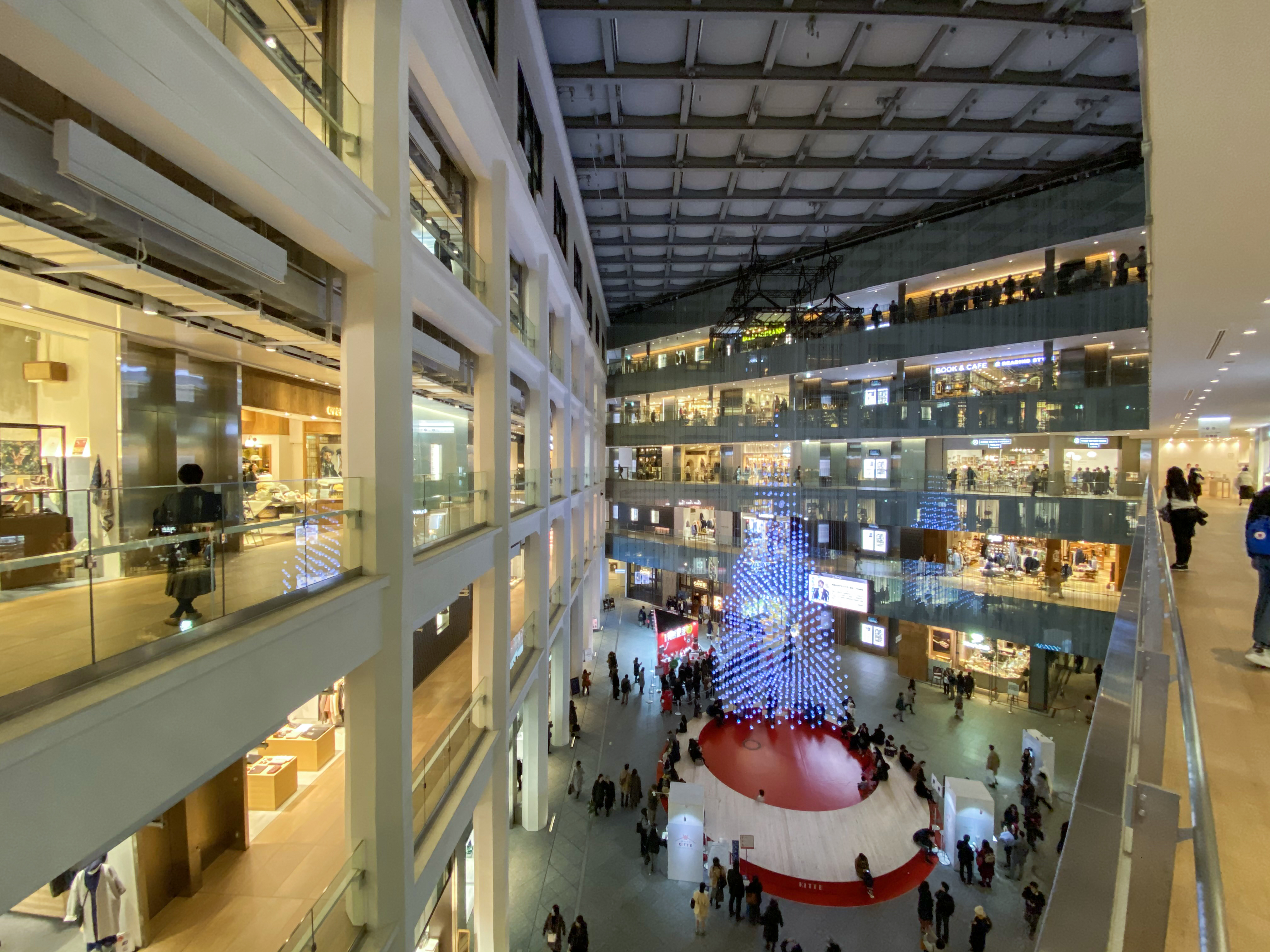 KITTE Marunouchi Atrium